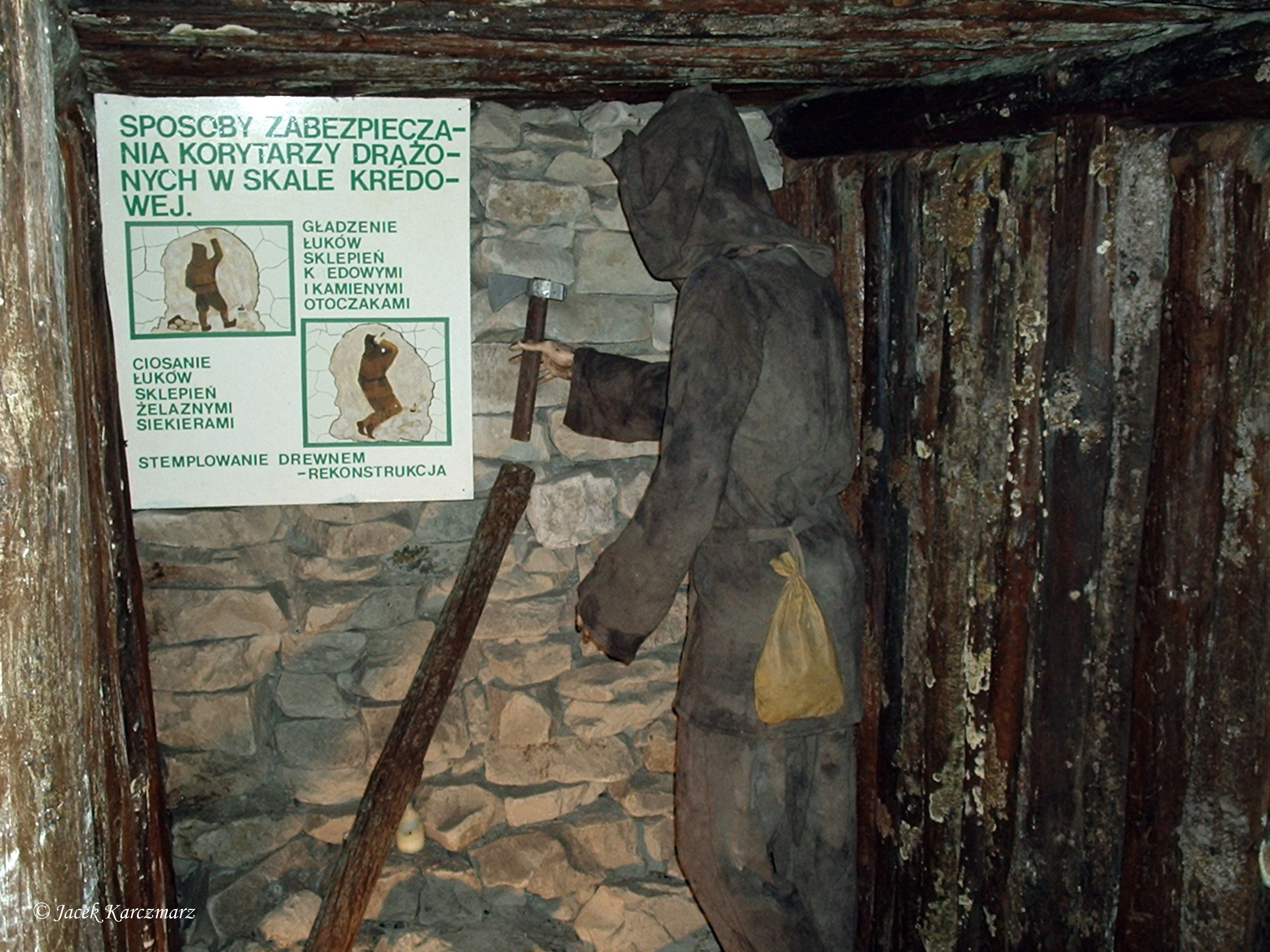 Podziemia kredowe w Chełmie